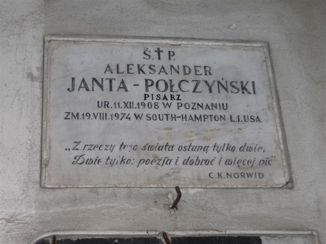 Aleksander Janta-Połczyński's monument (Powązki Cemetery)